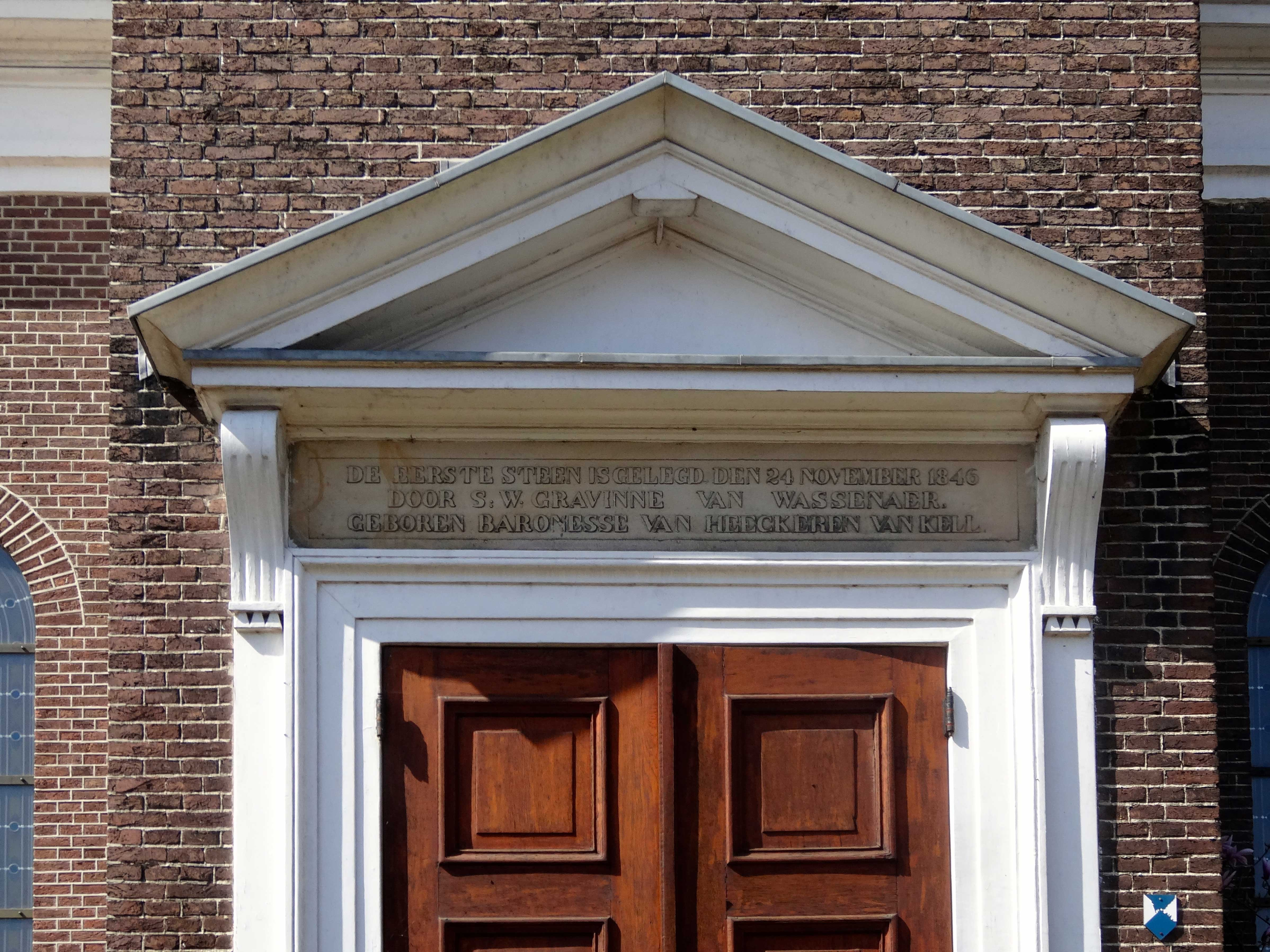 Entree (bovenzijde) van de dorpskerk van Dieren met de volgende vermelding: "de eerste steen is gelegd den 24 november 1846 door S.W. gravinne van Wassenaer geboren baronesse van Heeckeren van Kell"